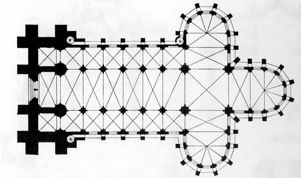 St Elizabeth's, Marburg. Plan, from G. Dehio and G.von Bezold, Die kirchliche Baukunst des Abendlandes, Stuttgart, 1901, Vol 4, Fig. 453 Lithograph